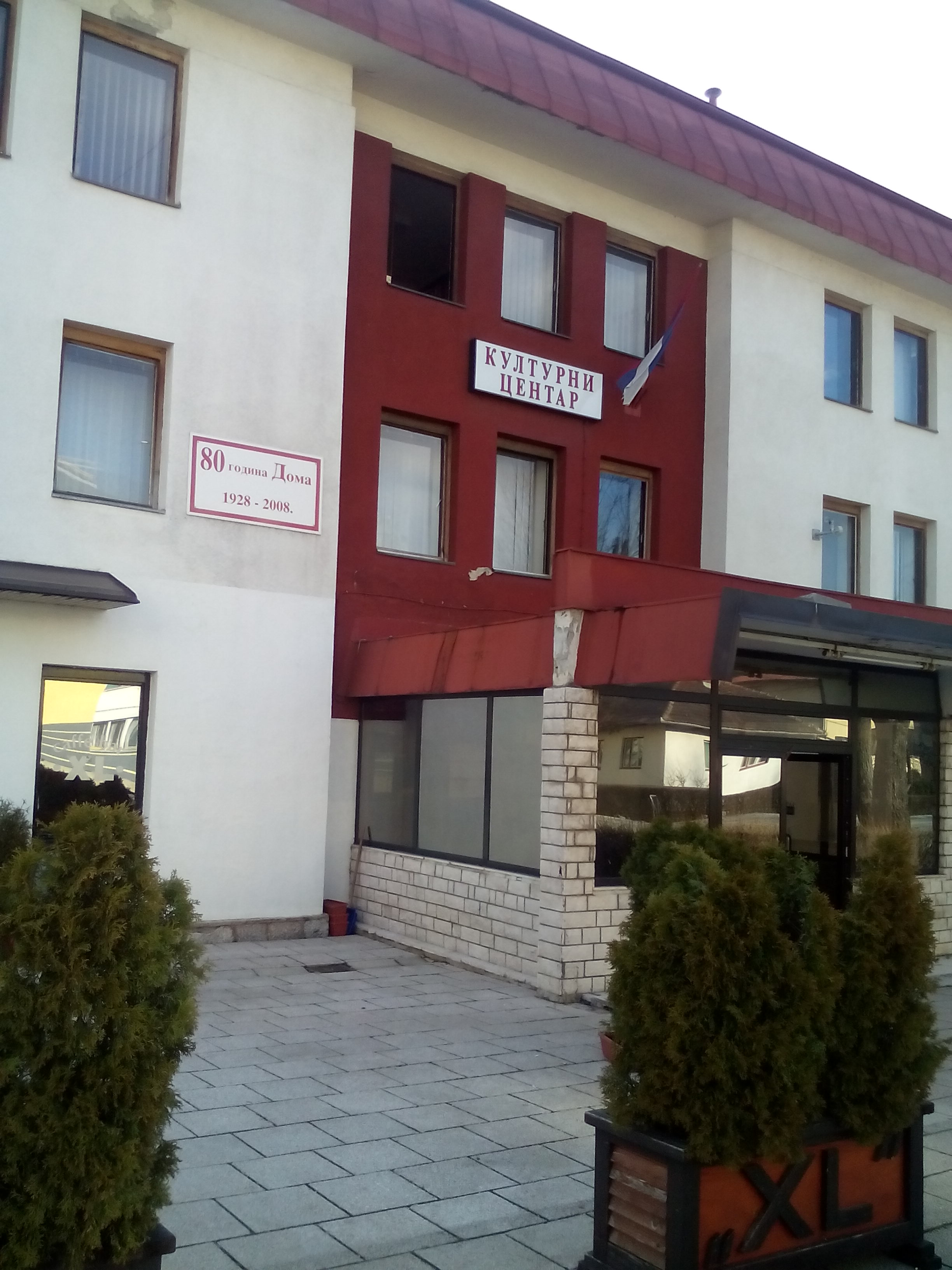 Културни центар Пале